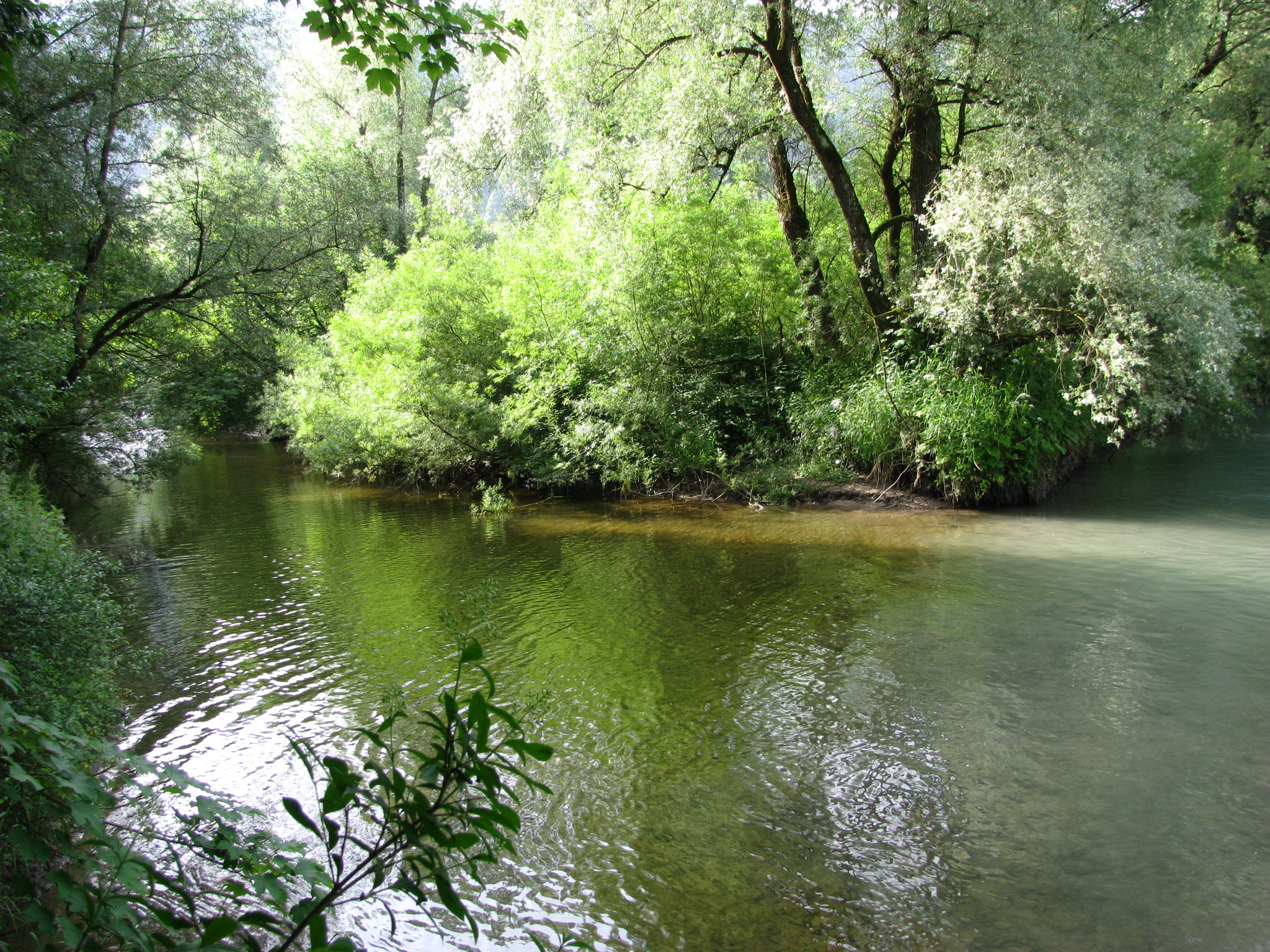 Mündung der Rottach in die Iller, Landkreis Oberallgäu